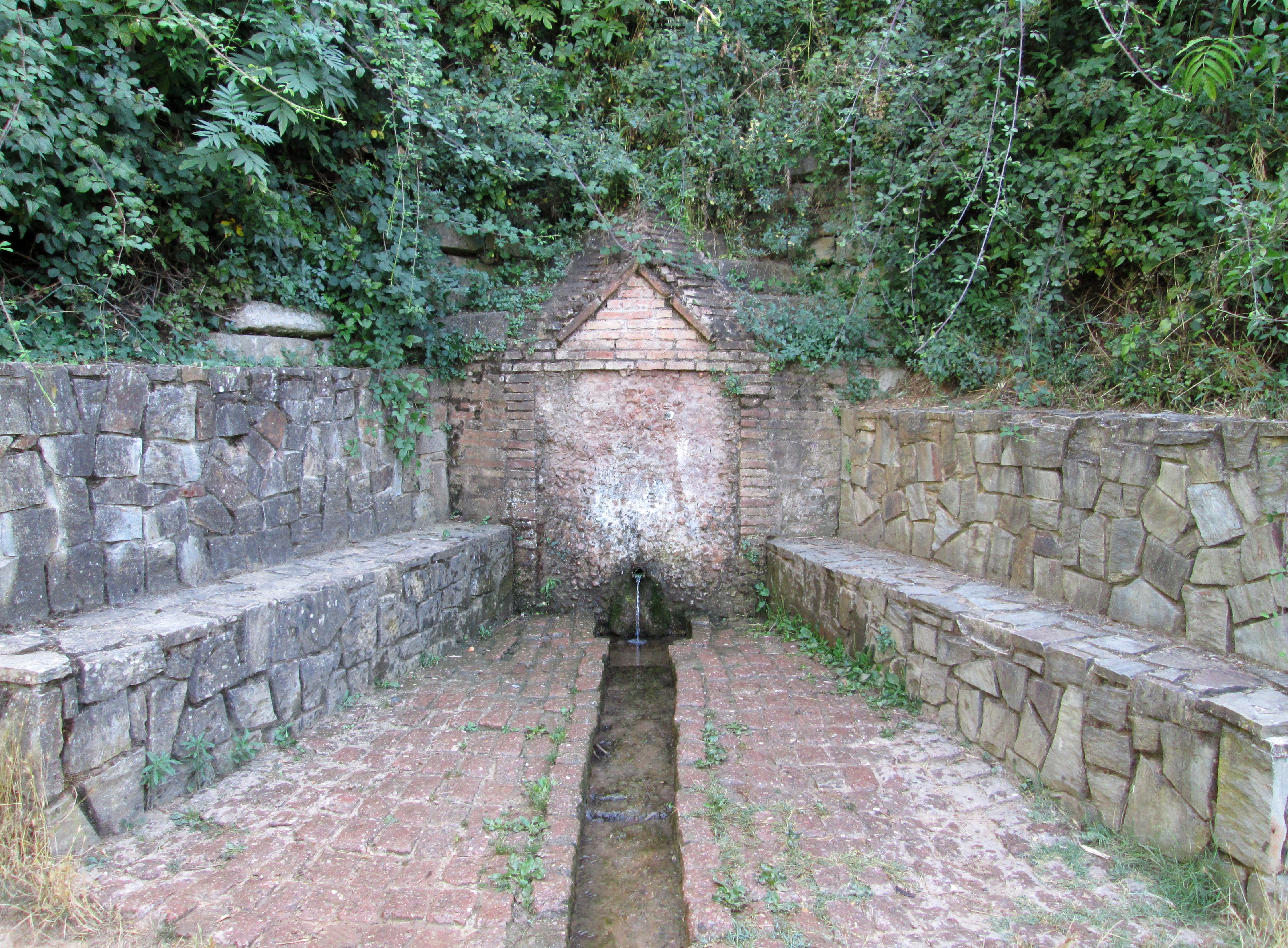 Fuente Vieja de la Salut, situada al lado del torrente de Canyameres, en Sabadell, Barcelona (España).